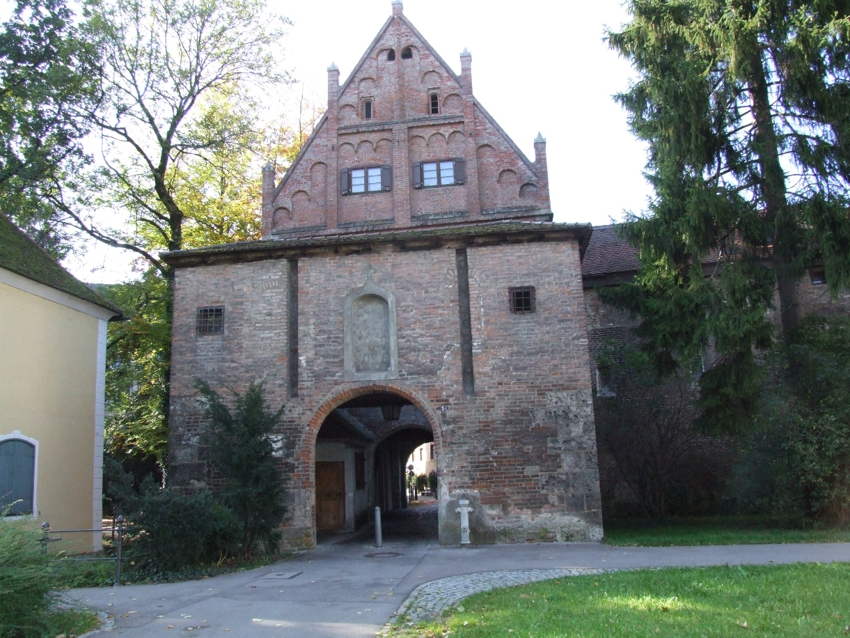 Der Einlaß (Erbaut 1475)